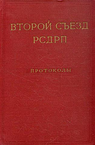 Коллектив авторов. — Сборник документов и материалов цикла «КПСС в стенограммах, документах и материалах». — М.: Госполитиздат, 1959 — XX + 851 с.: ил.